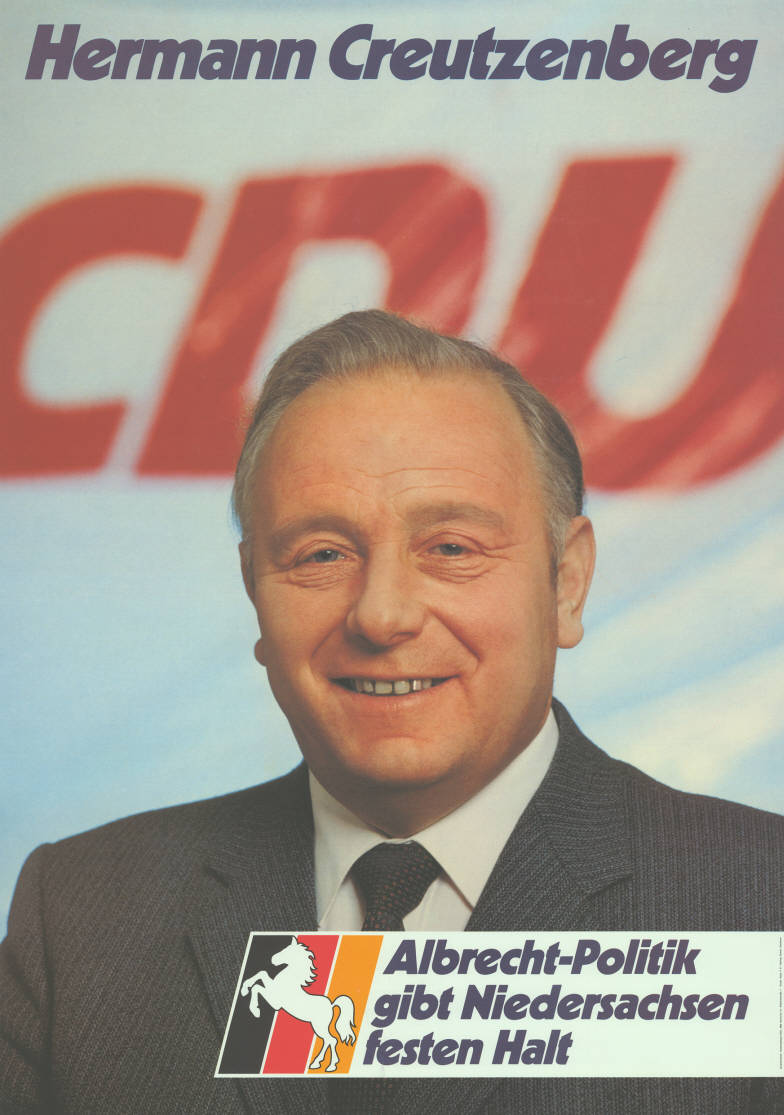 Hermann Creutzenberg CDU Albrecht-Politik gibt Niedersachsen festen Halt Abbildung: Porträtfoto - Nationalfarben mit Niedersachsenross Plakatart: Kandidaten-/Personenplakat mit Porträt Auftraggeber: Verantw.: Niedersachsen-CDU, Hannover Drucker_Druckart_Druckort: Willy F.P. Fehling GmbH, Hannover Objekt-Signatur: 10-008 : 498 Bestand: Landtagswahlplakate Niedersachsen (10-008) GliederungBestand10-18: Landtagswahlplakate Niedersachsen (10-008) » CDU Lizenz: KAS/ACDP 10-008 : 498 CC-BY-SA 3.0 DE